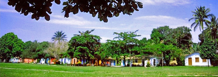 Trancoso, Bahia, Brazil